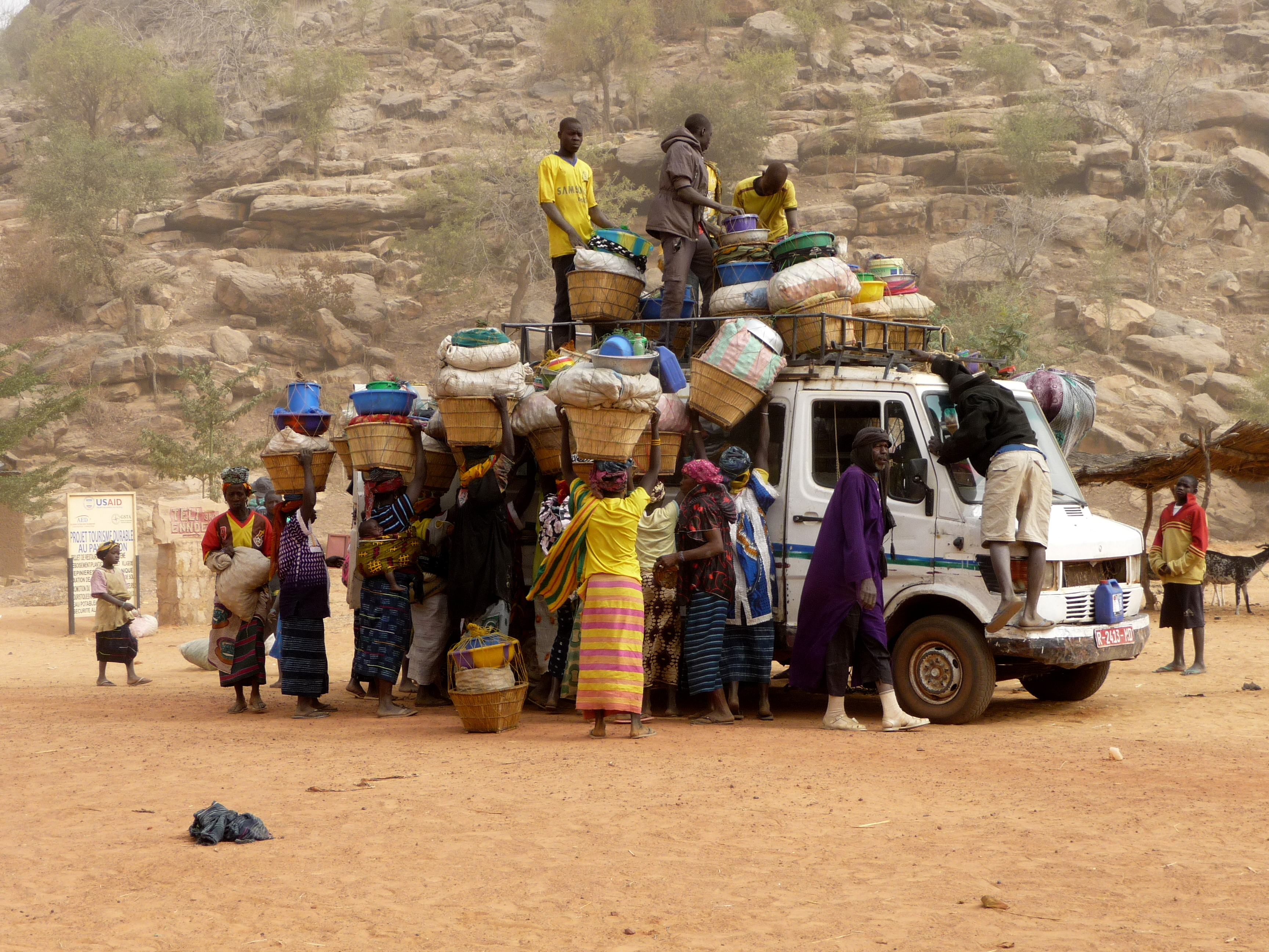 Ces femmes arrivaient de Kani Kombolé avec des monticules de 30 kg sur la tête et rejoignaient le petit camion qui devaient les emmener passer la journée au marché à une dizaine de kilomètres. Incroyable tout ce qui a pu s'entasser sur le toit et dans le camion entre marchandises et personnes ! This is an image with the theme "Africa on the Move or Transport" from: Mali